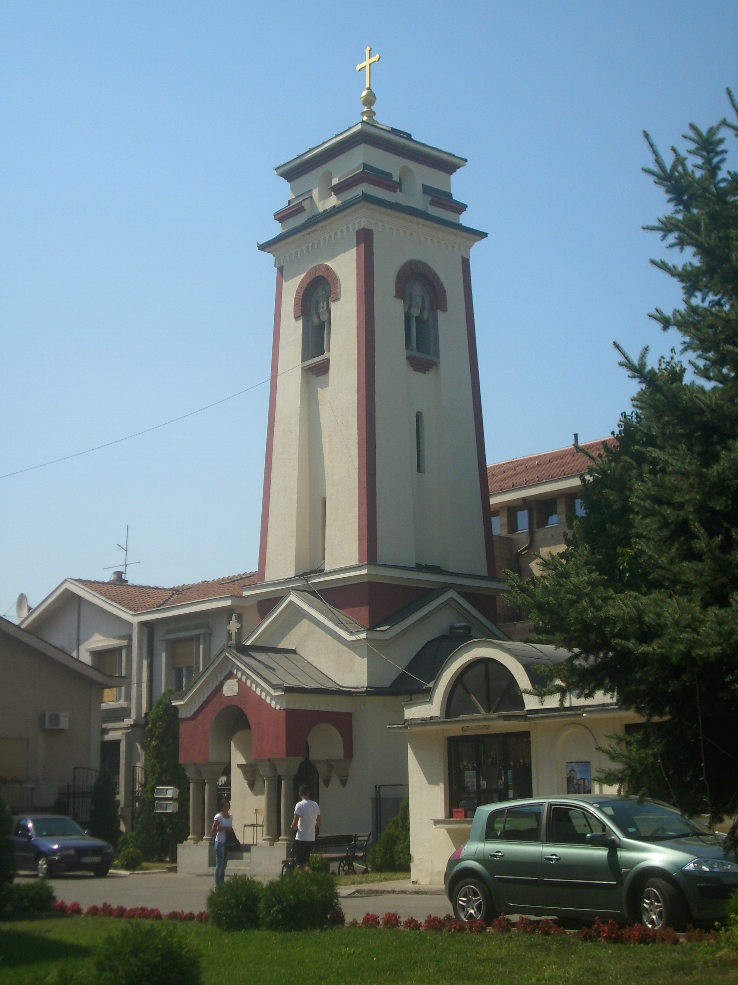 Саборна црква Успења пресвете Богородице у Крагујевцу